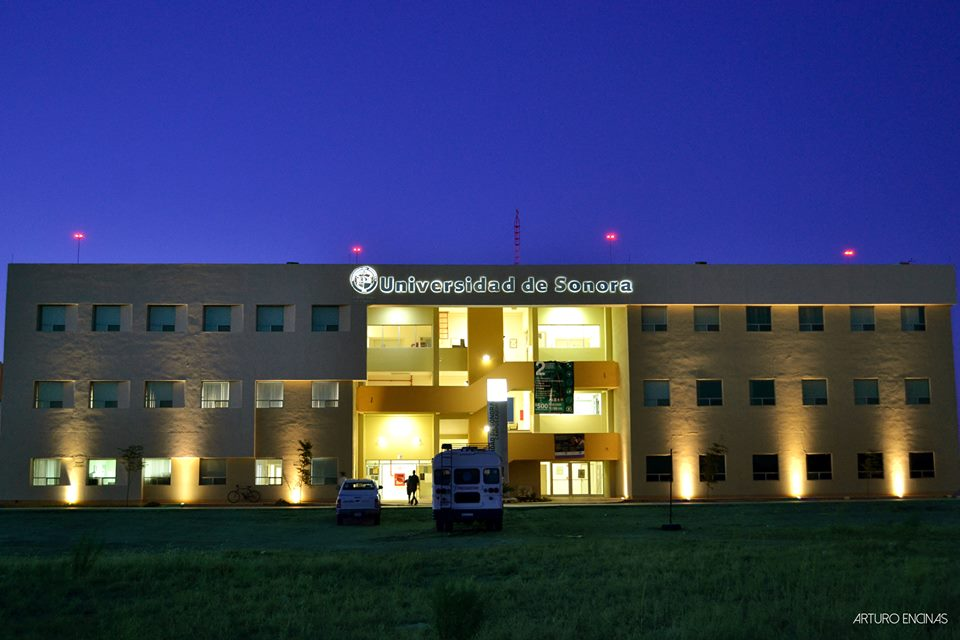 Universidad de Sonora, División de Ciencias Biológicas y de la Salud